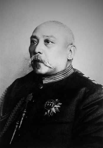 中华民国时期的袁世凯